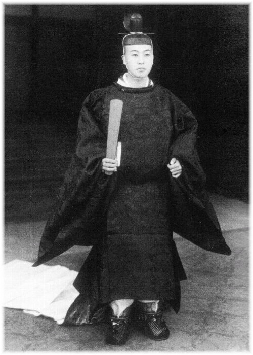 賀陽宮邦寿王